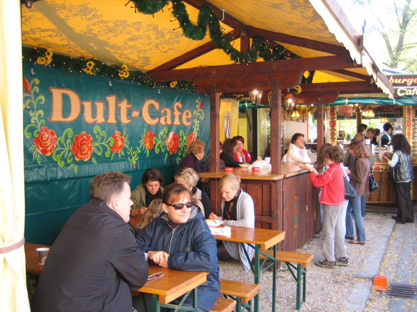 Herbstdult 2010 in Augsburg, das Dult-Cafe lädt zur Rast ein